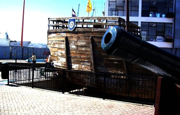 Réplica de la Carabela Santiaguillo en el Muelle Prat de Valparaíso